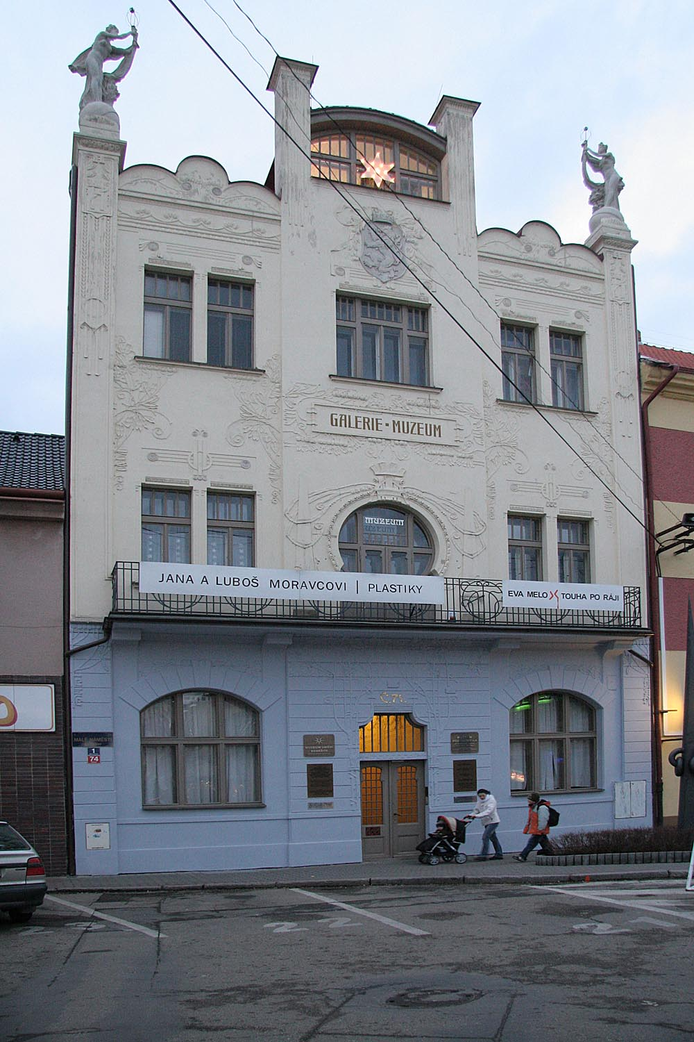 Budova Městského muzea v Benešově